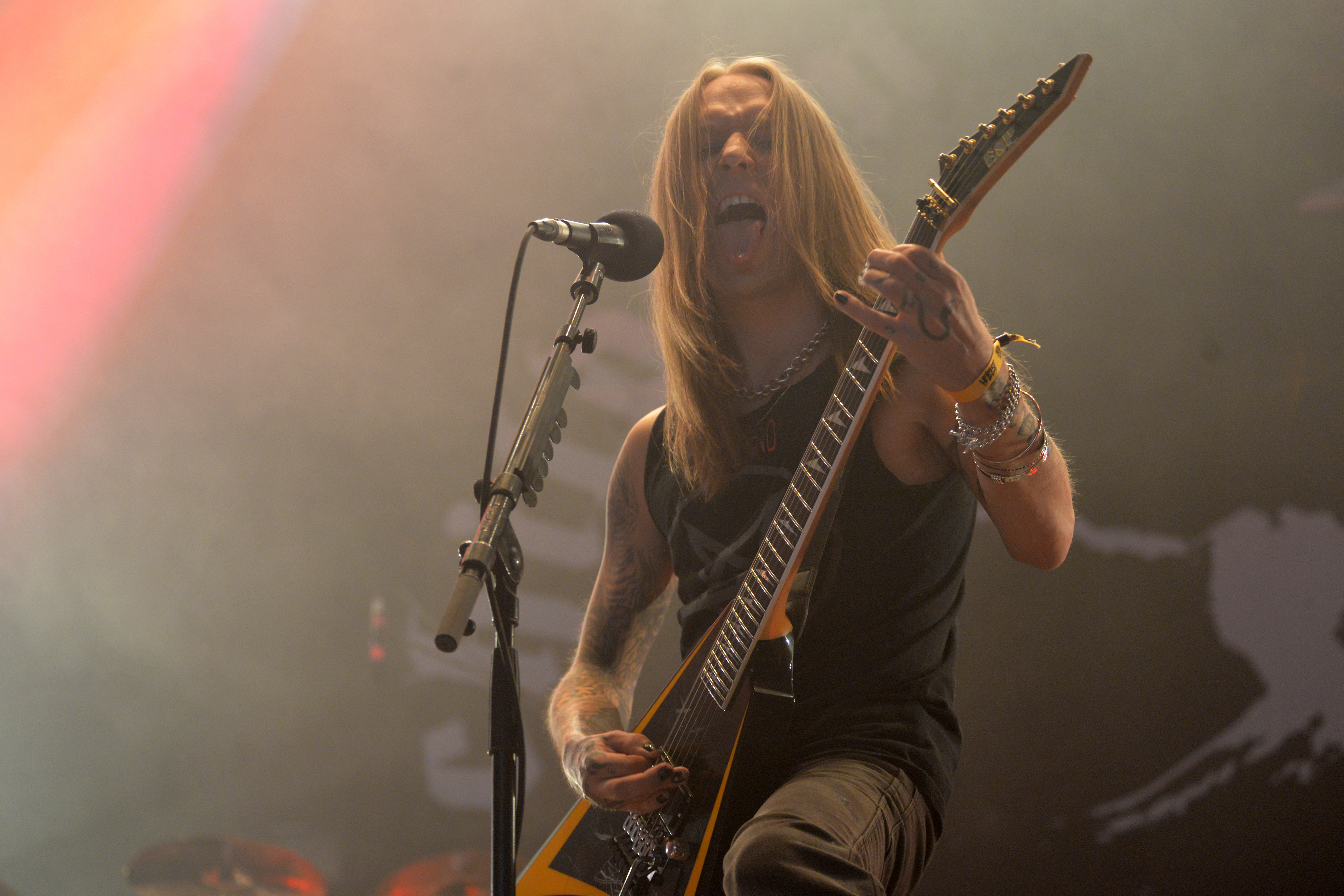 Le groupe finlandais Children of Bodom, Hellfest 2018.